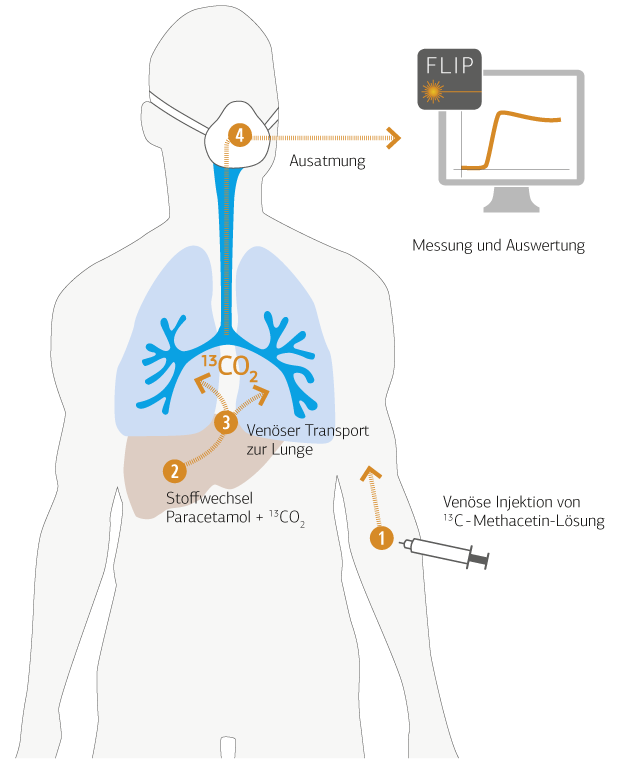 LiMAx liver function test, all rights reserved Humedics GmbH, 2012